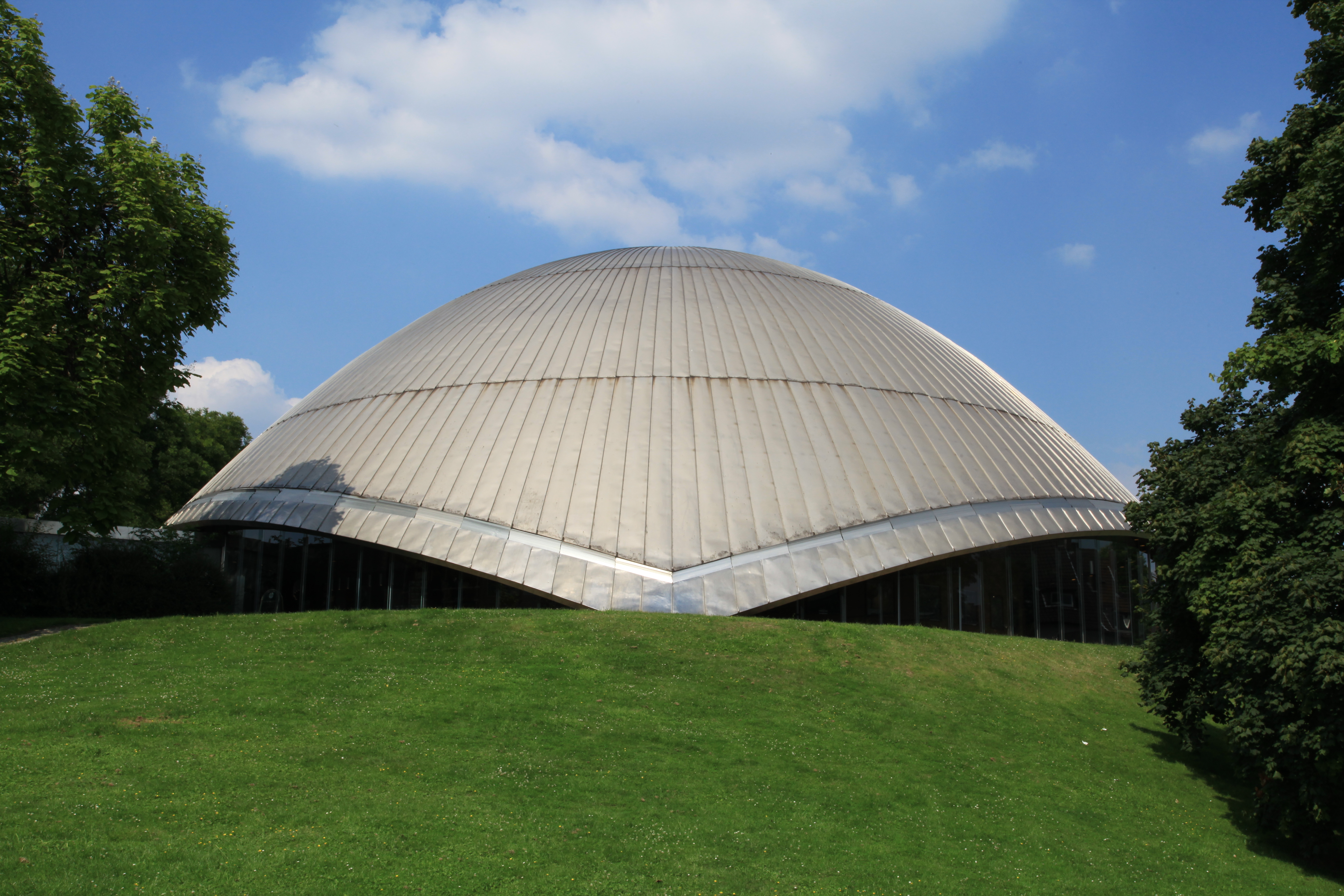 Zeiss Planetarium an der Castroper Straße in Bochum